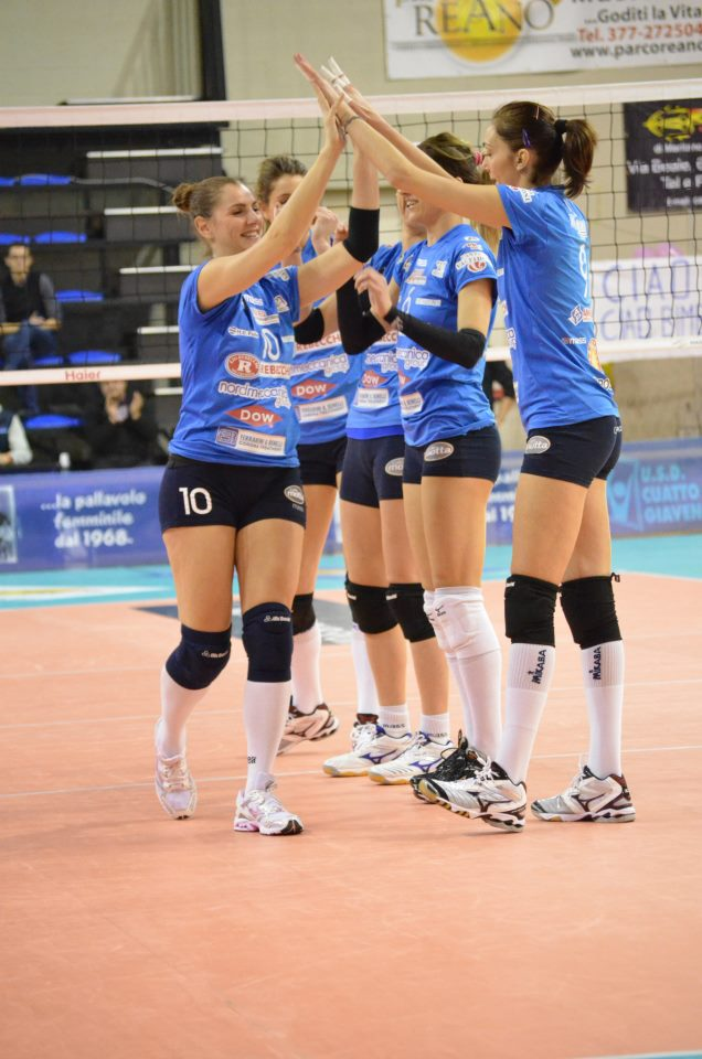 Stagione 2012-2013